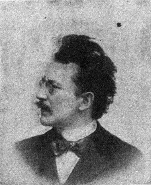 Österreichischer Politiker, Reichsratswahl 1907, Name siehe Dateiname